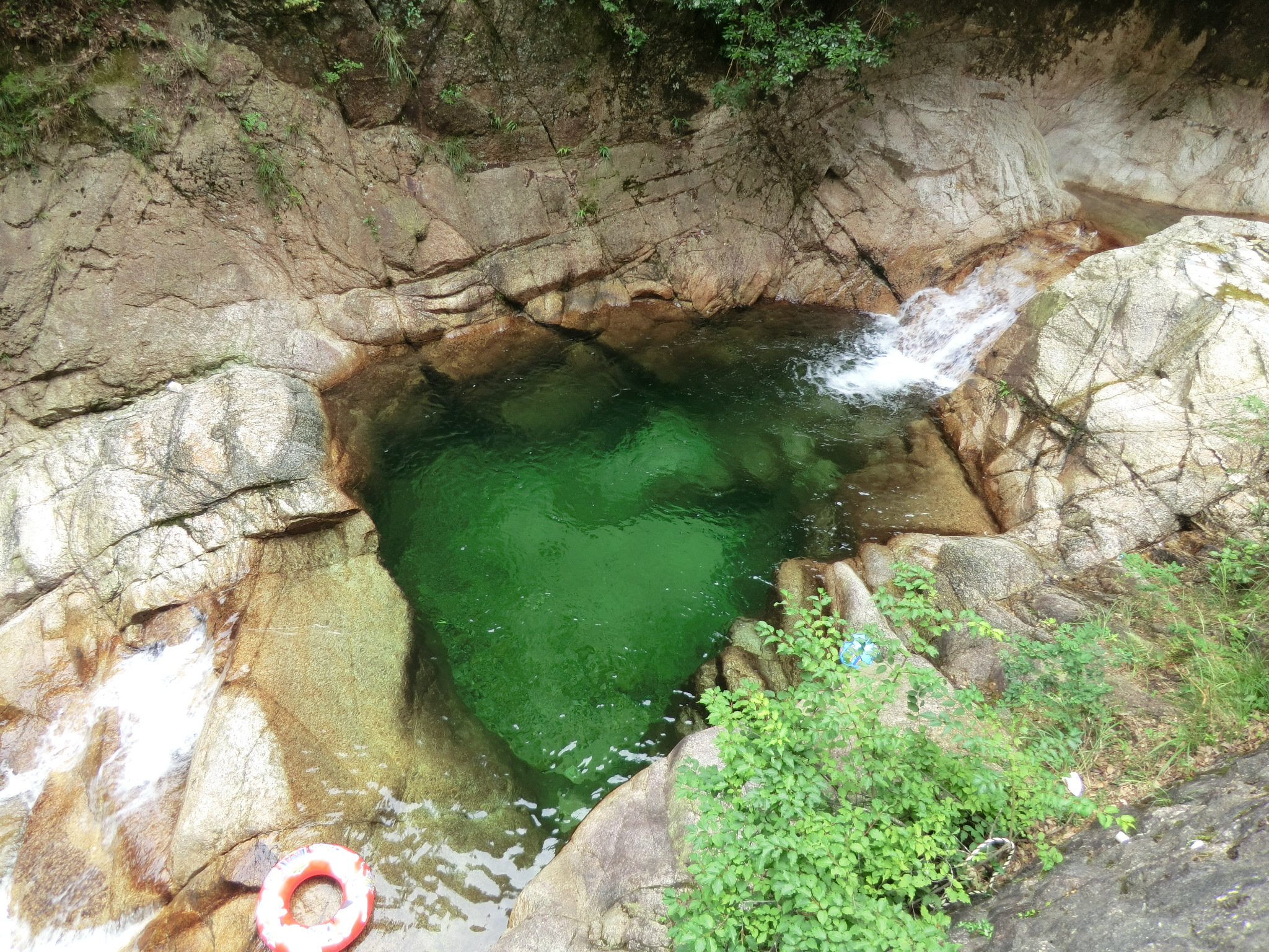 三重県亀山市安坂山町にある小さな滝。石水渓